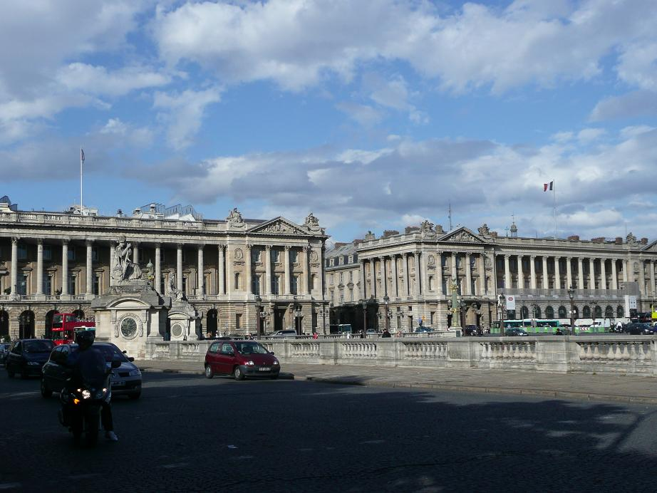 Place de la Concorde, Paris